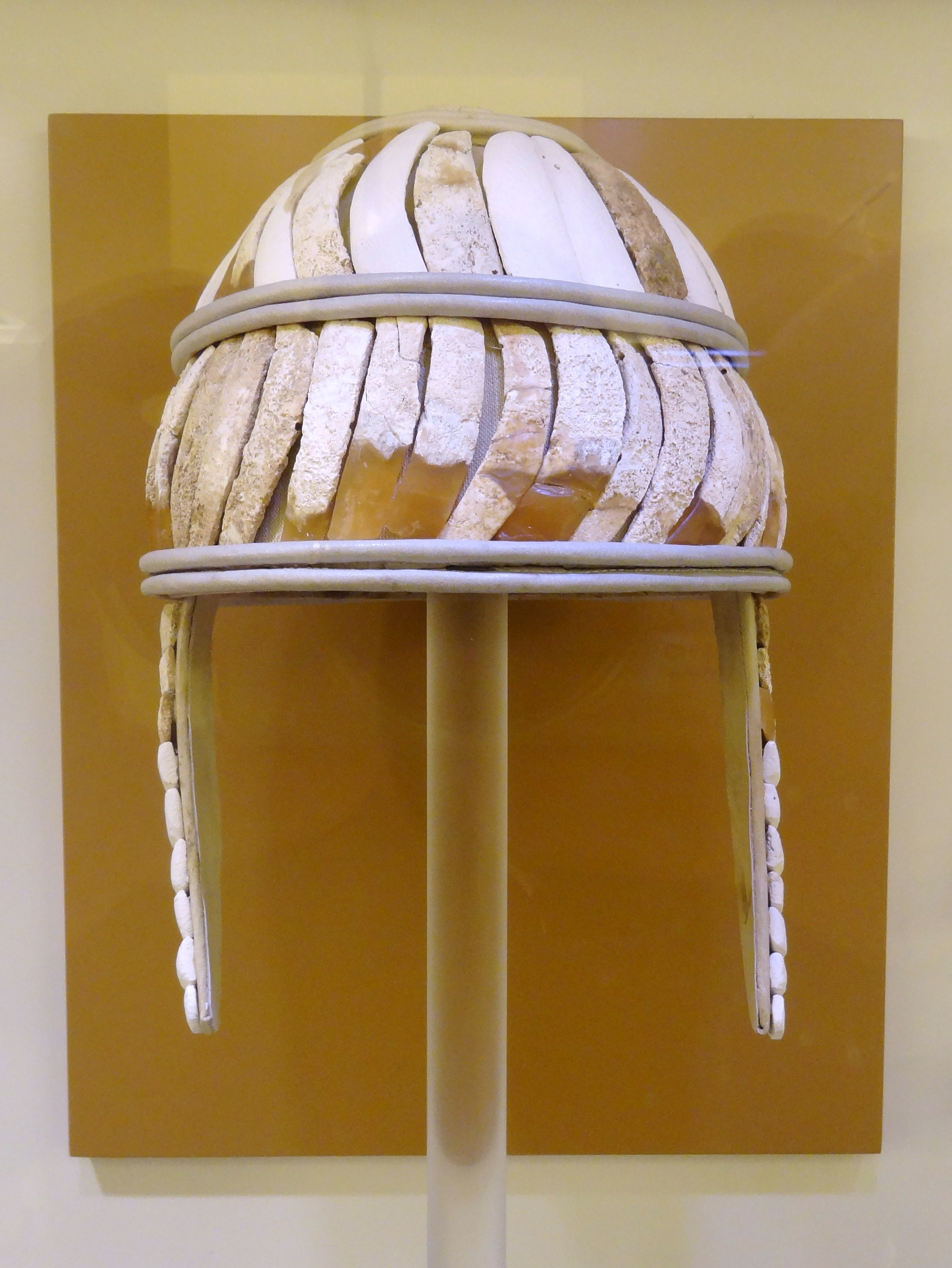 Eberzahnhelm (1450–1400 v. Chr.) aus Knossos, ausgestellt im Archäologischen Museum Iraklio, Kreta, Griechenland